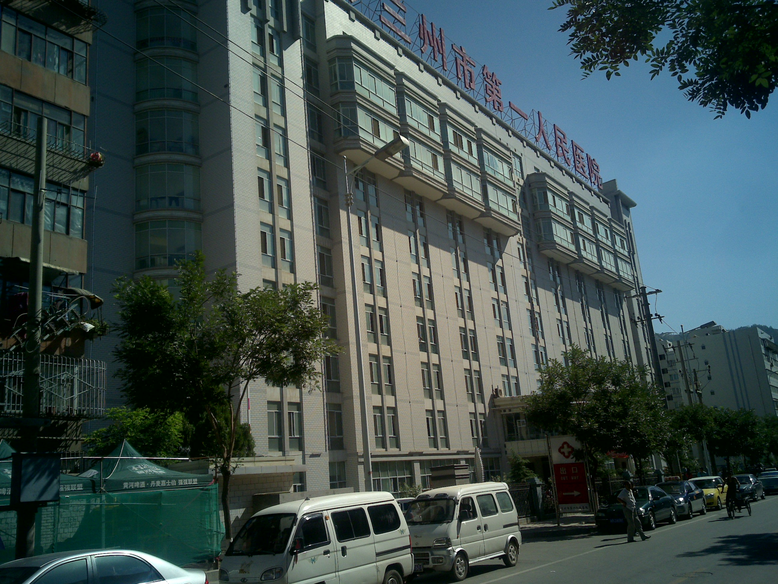 兰州市第一人民医院